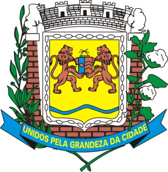 Brasão da cidade de Fernandópolis, SP